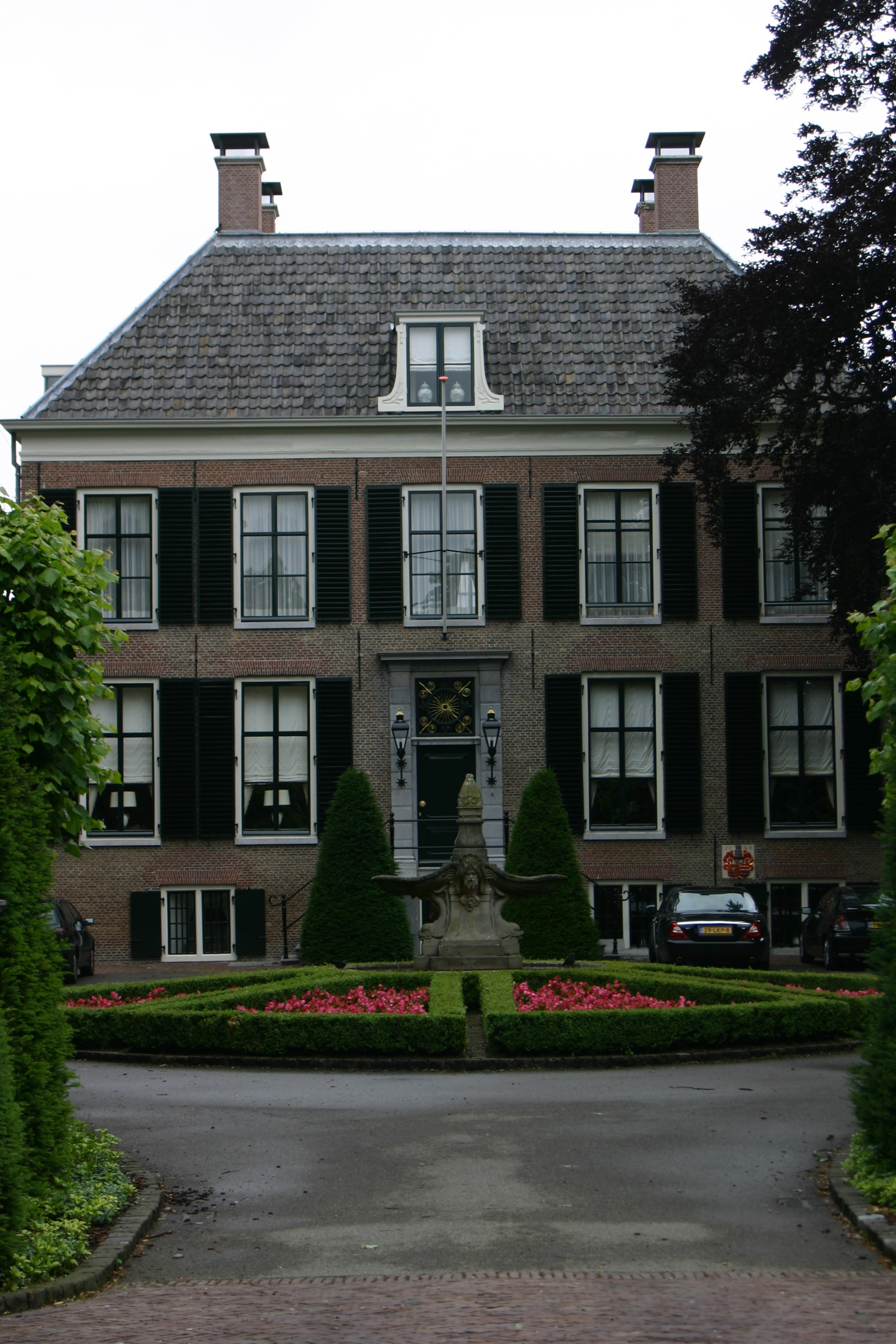 Wilhelminalaan 13